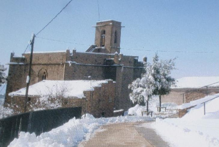 L'església de Sant Maria de Rubió nevada.